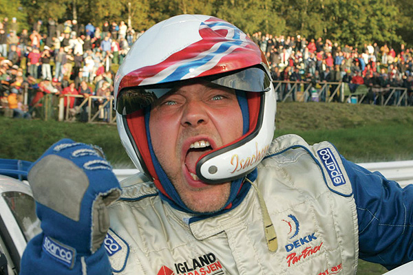 Rallycross-EM 2005: Sverre Isachsen (N) nach seinem Sieg am 02.10.2005 auf dem Estering in Buxtehude (D).